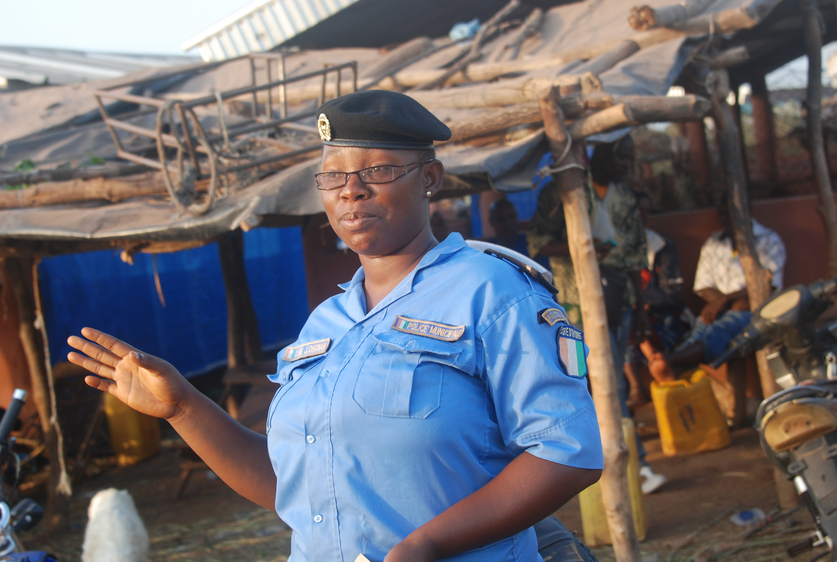 Une femme agent de police municipale à Ferké dans le Nord de la Cote d'Ivoire. This is an image of "African people at work" from Ivory Coast